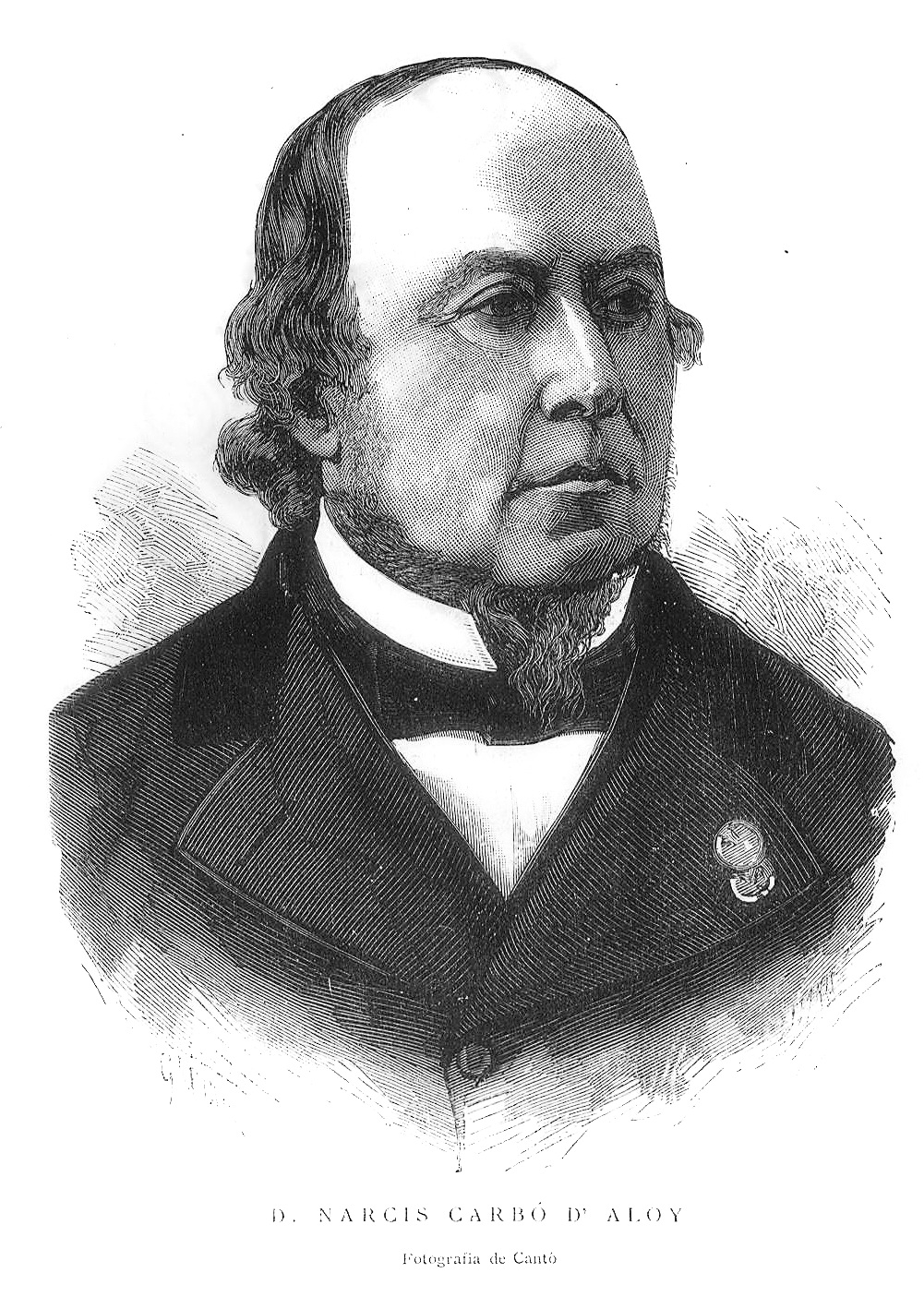 Narcís Carbó i d'Aloi (Barcelona, 1826 - 1890), fou un metge, catedràtic de la Universitat de Barcelona